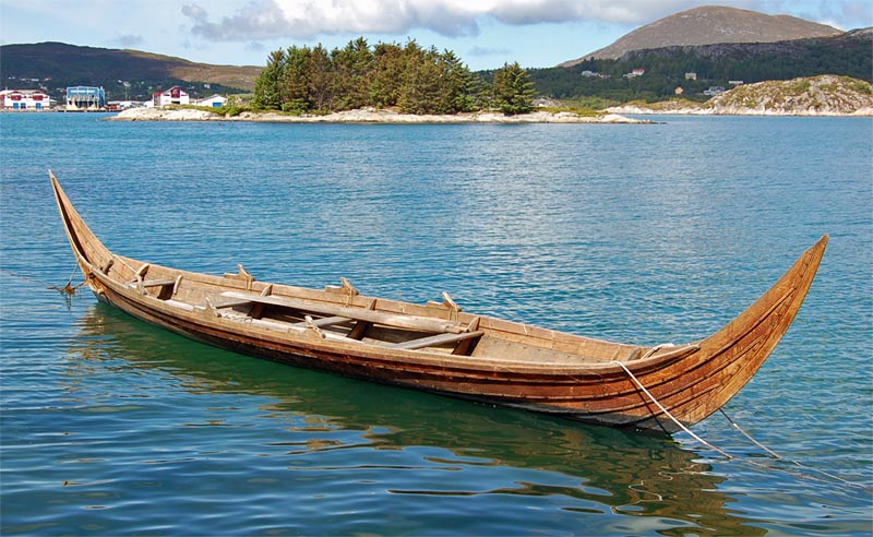 Rekonstruktion des Kvalsundfæringers am Herøy kystmuseum